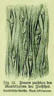 Fig. 32. Finnen zwischen den Muskelfasern des Fleisches. Natürliche Größe. Nach Uffelmann.